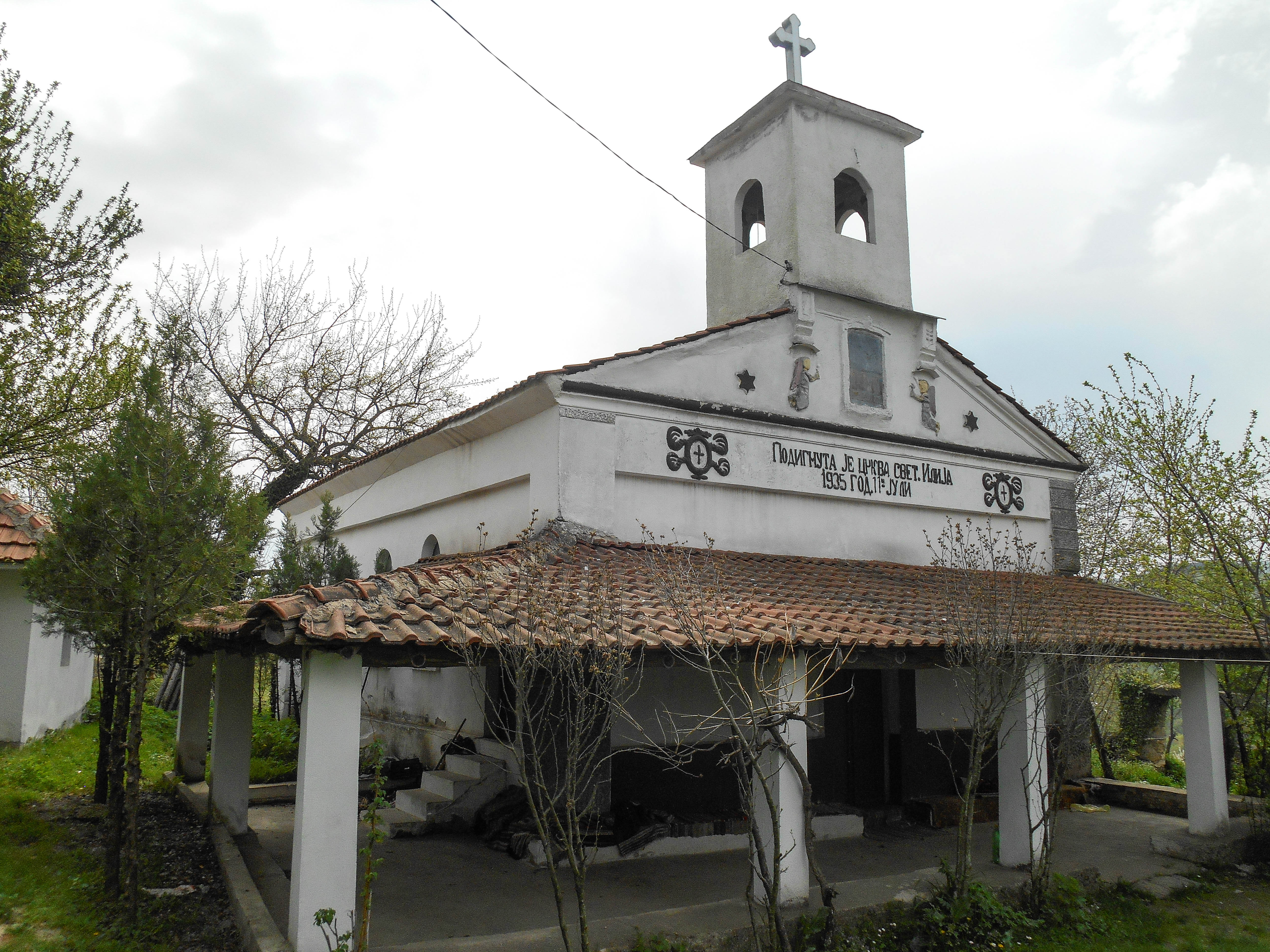 Црква Свети Илија